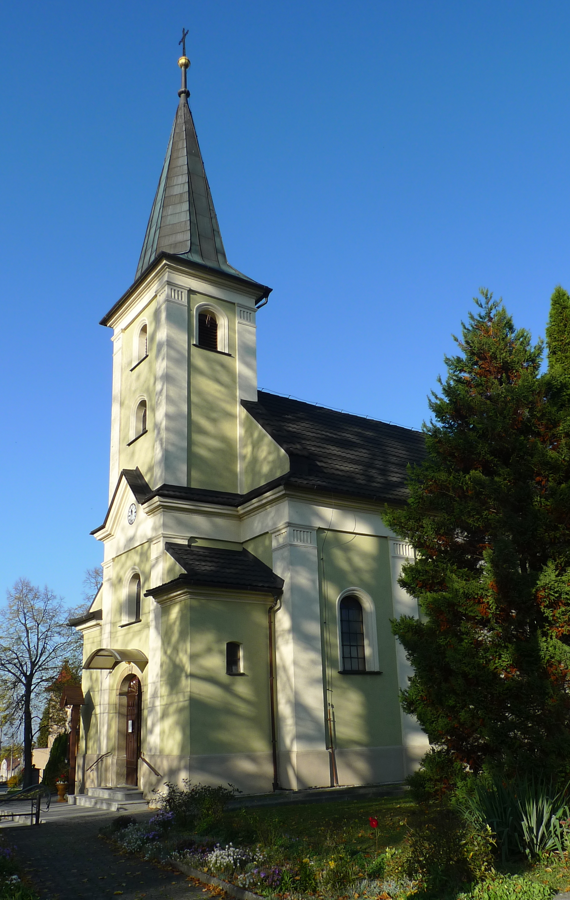 Chlebovice, kostel z roku 1863